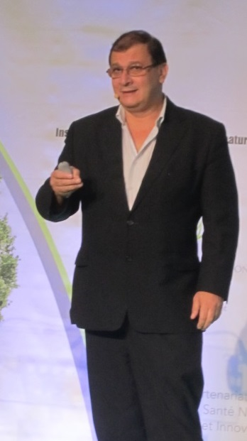 Pr GE Séralini . Congrès 4 octobre 2015